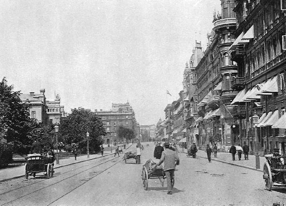 Vasagatan runt förra sekelskiftet